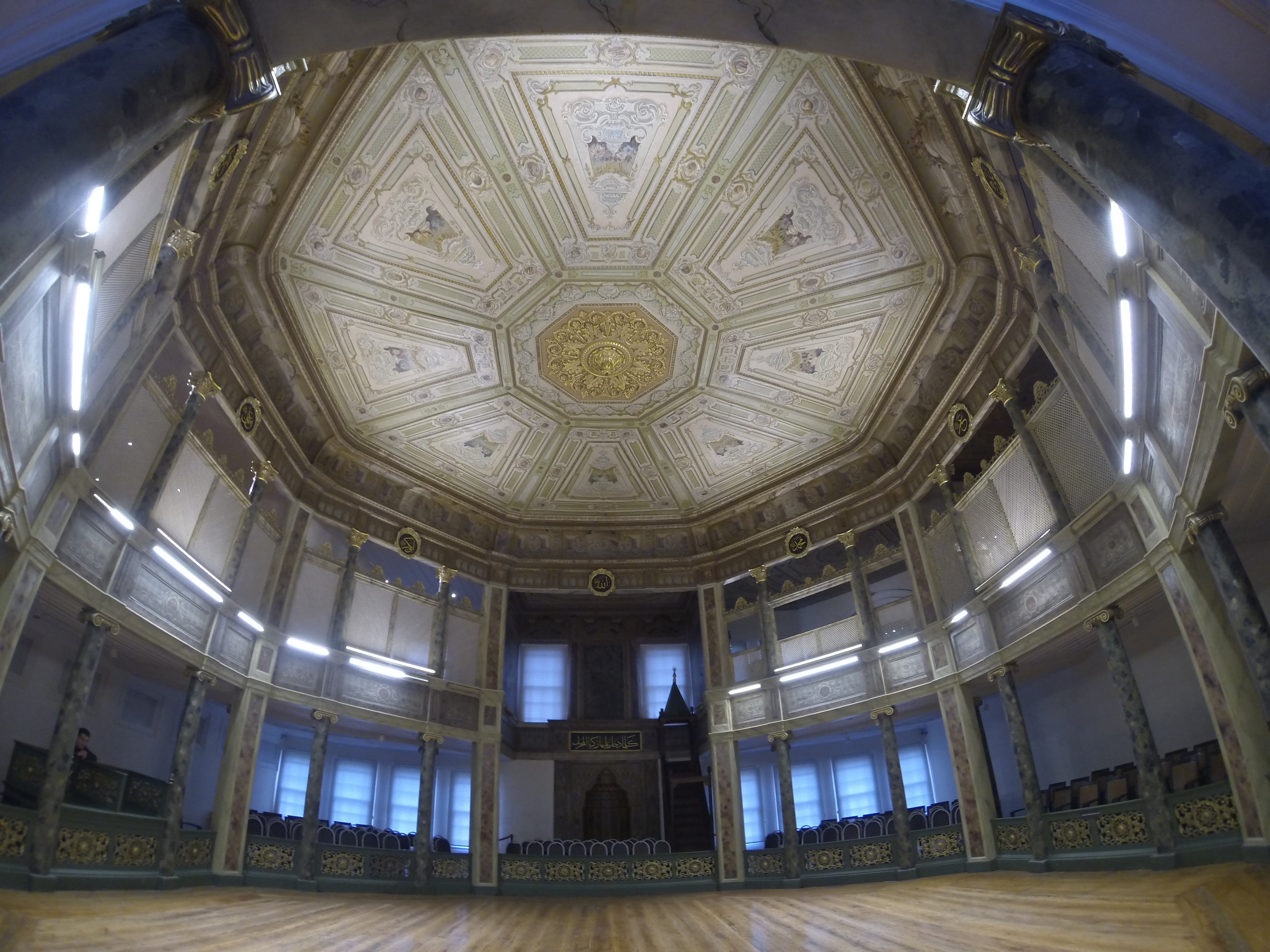 Galata Mevlevihanesi